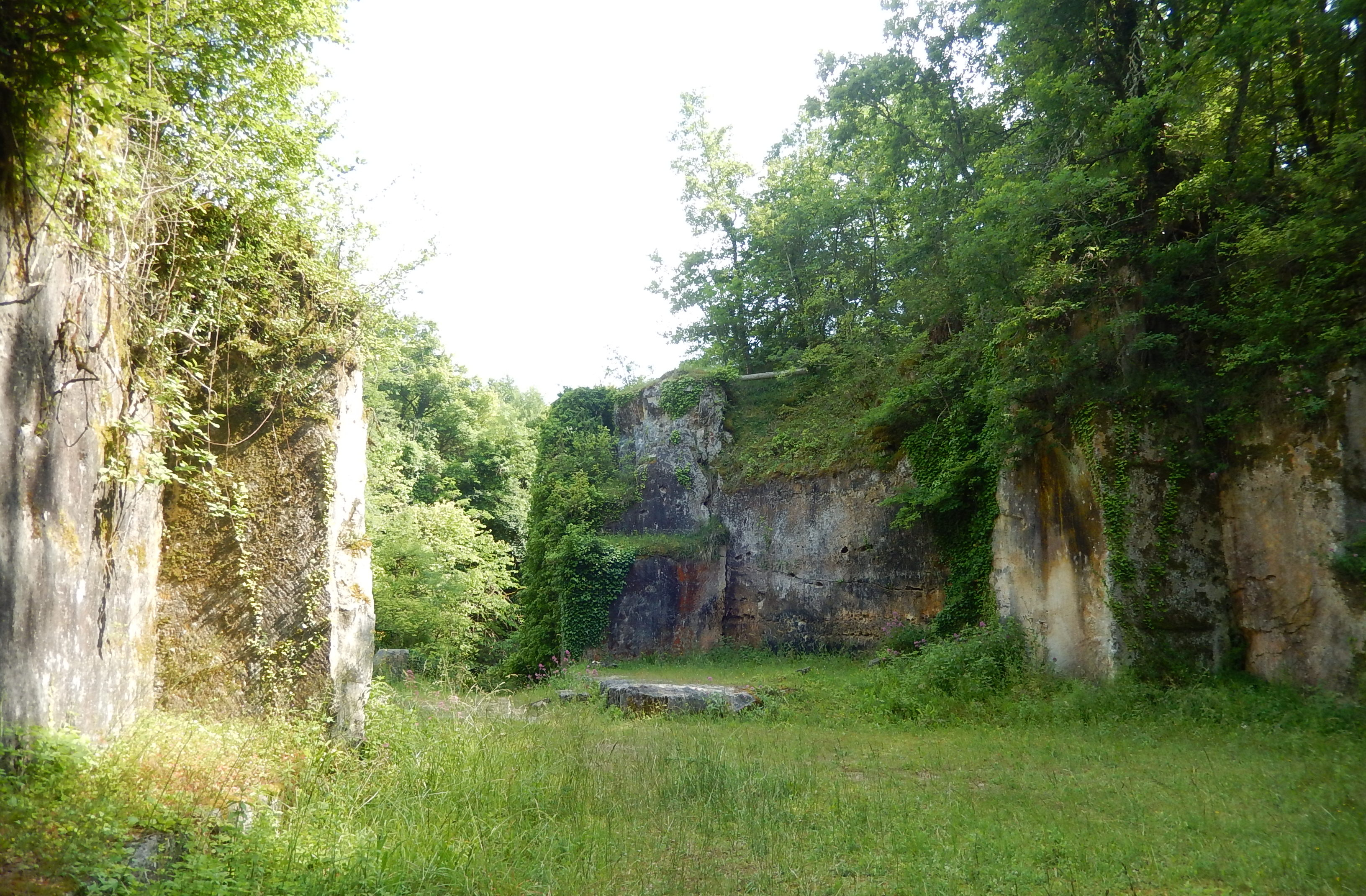 Anciennes carrières de pierre calcaire. Commune de Crazannes (Charente-Maritime, France).